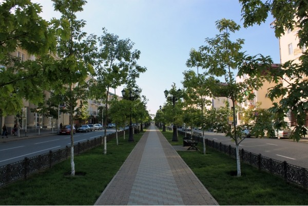 Улица Кадырова